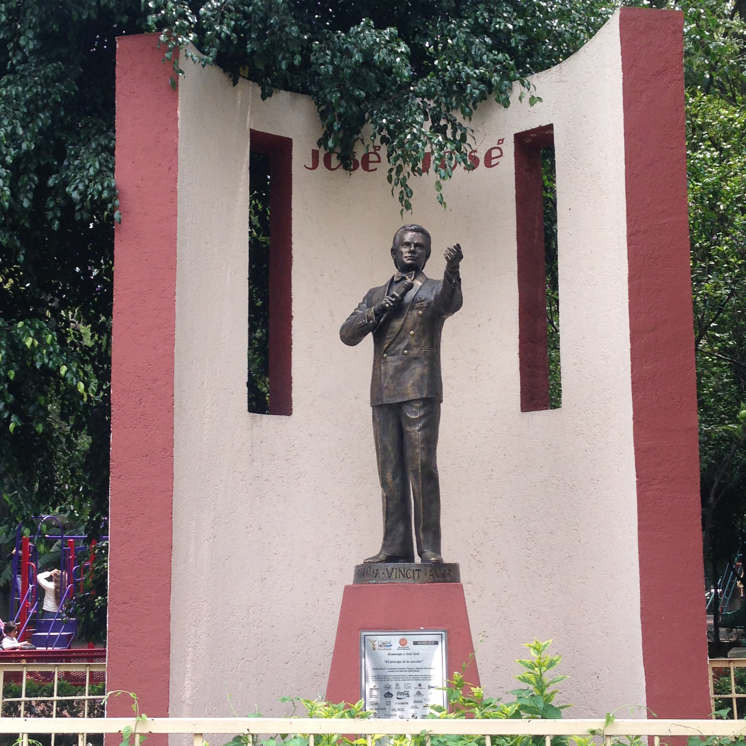 Estatua de José José en la colonia Claveria, Ciudad de México.